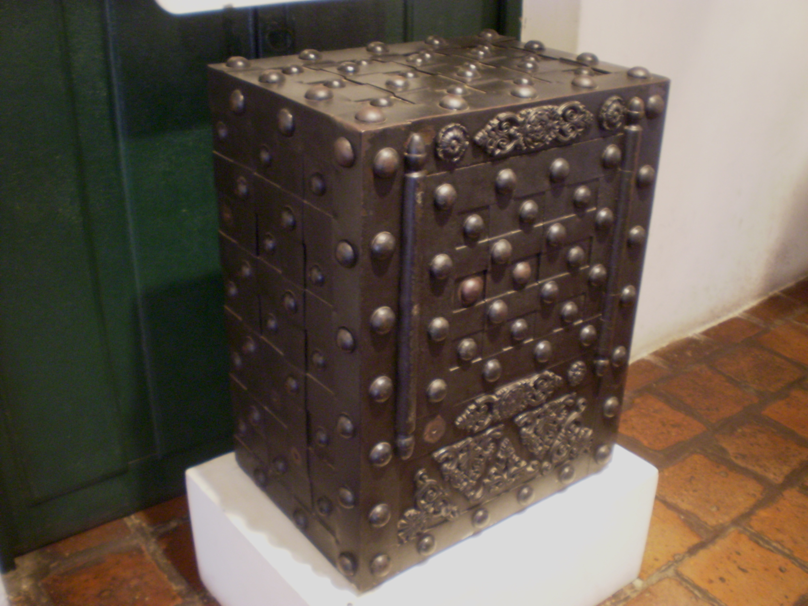 Caja de Caudales del S XVIII. Virreinato del Rio de La Plata. Acyualmente en el Museo Histórico del Norte de la ciudad de Salta . Argentina